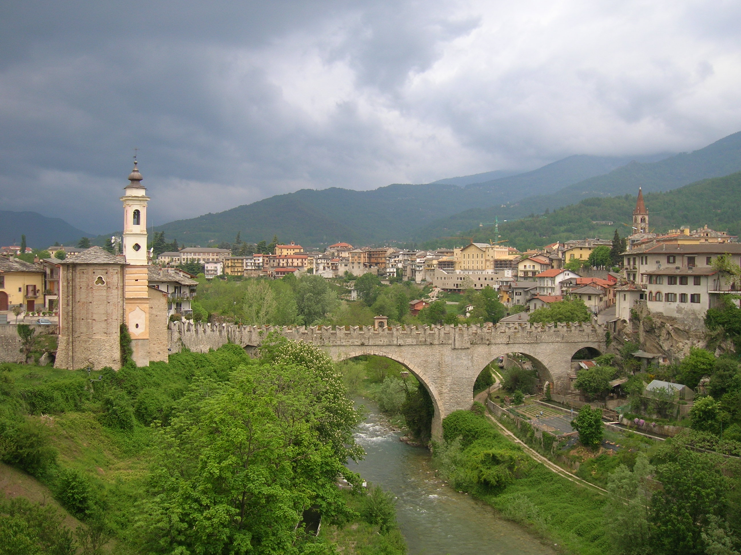 Dronero (ponte del Diavolo sul fiume Maira), Cuneo, Piemonte, Italy